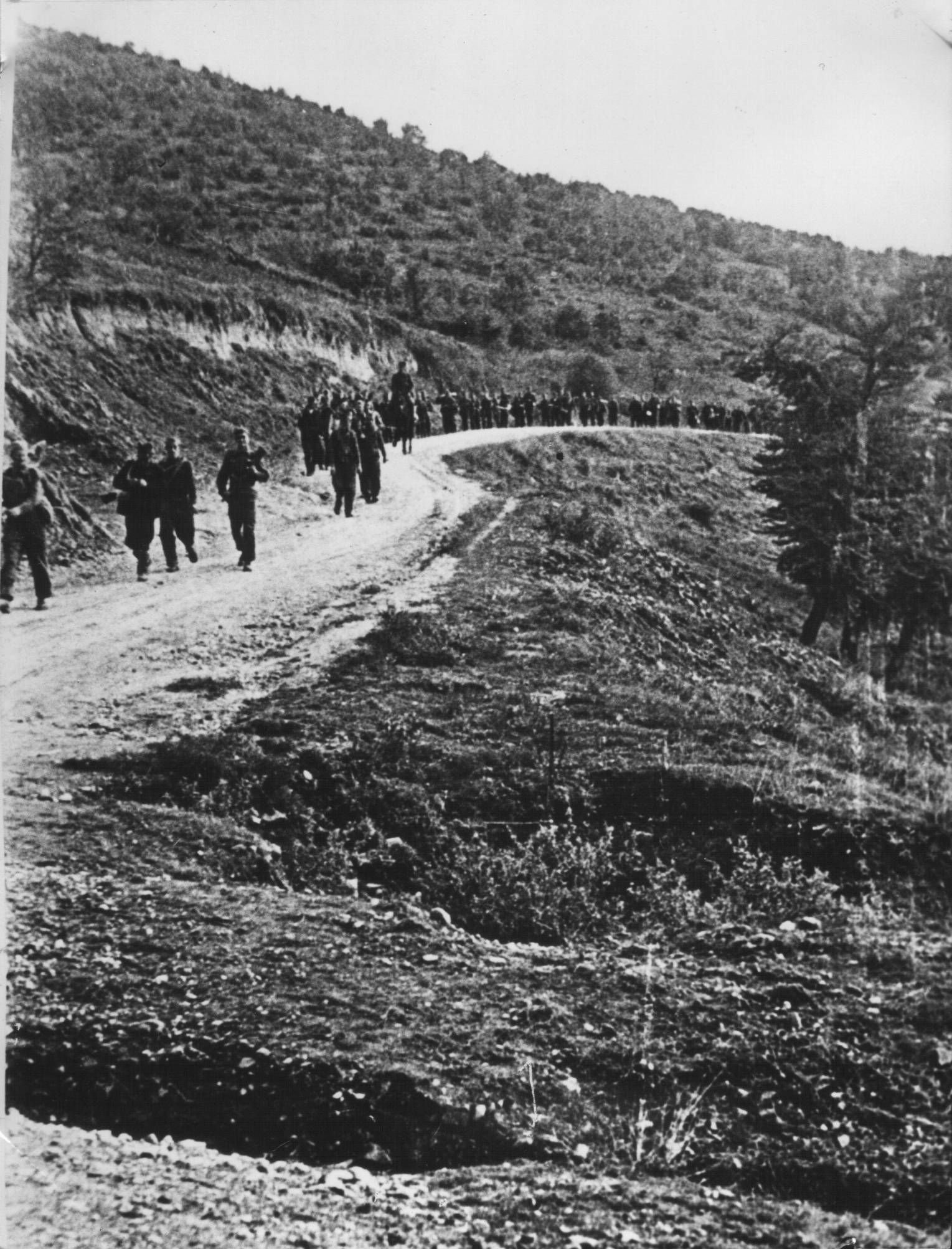 I partigiani del XIII Korpus in marcia durante le operazioni a Nis e Leskovac nel settembre 1944